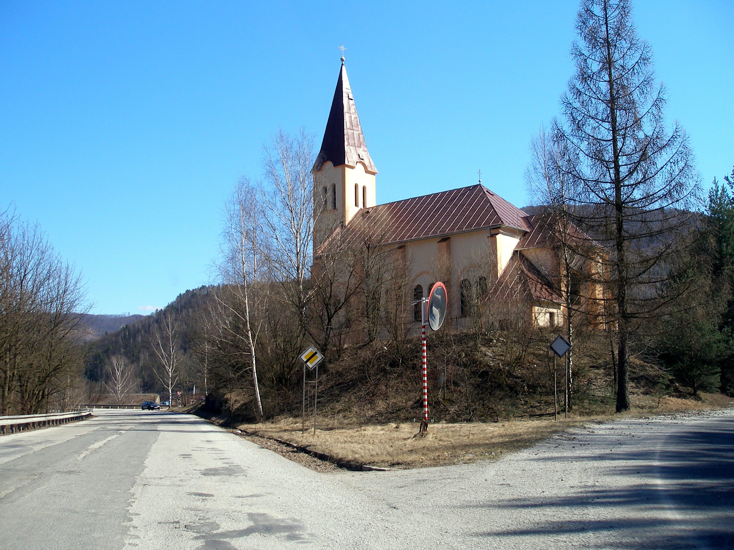 Obec Margecany, okres Gelnica.Región Spiš.